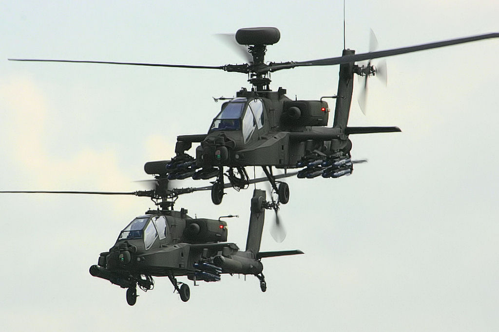 Apaches - RIAT 2005